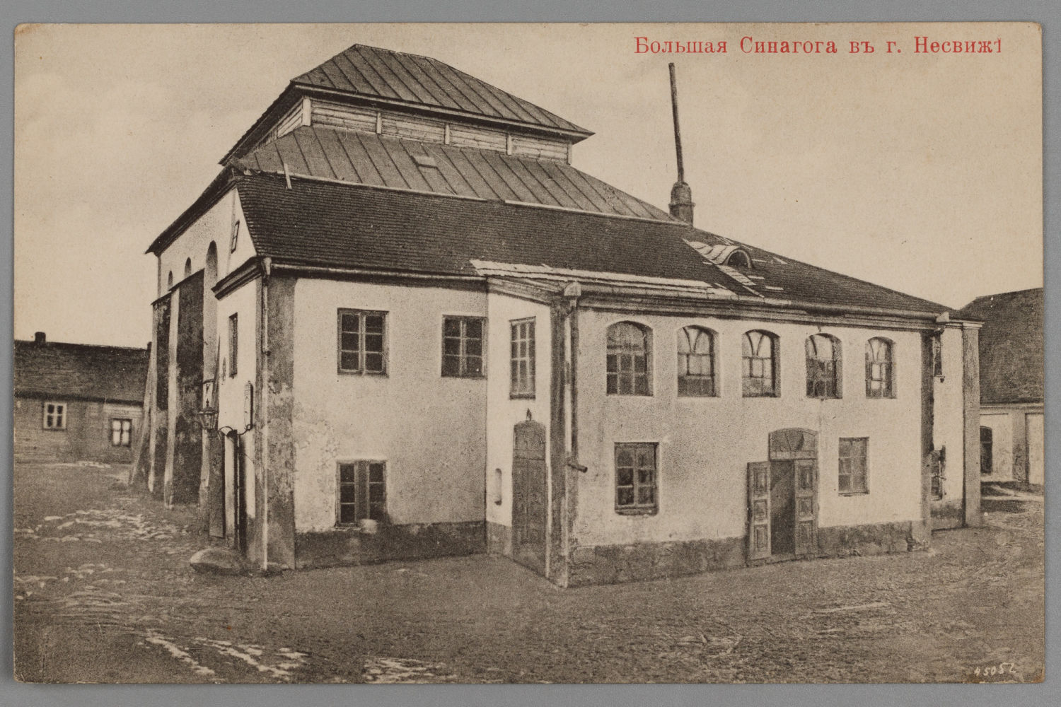 Беларуская (тарашкевіца): Нясьвіж (Niaśviž), Школішча (Školišča). Халодная сынагога